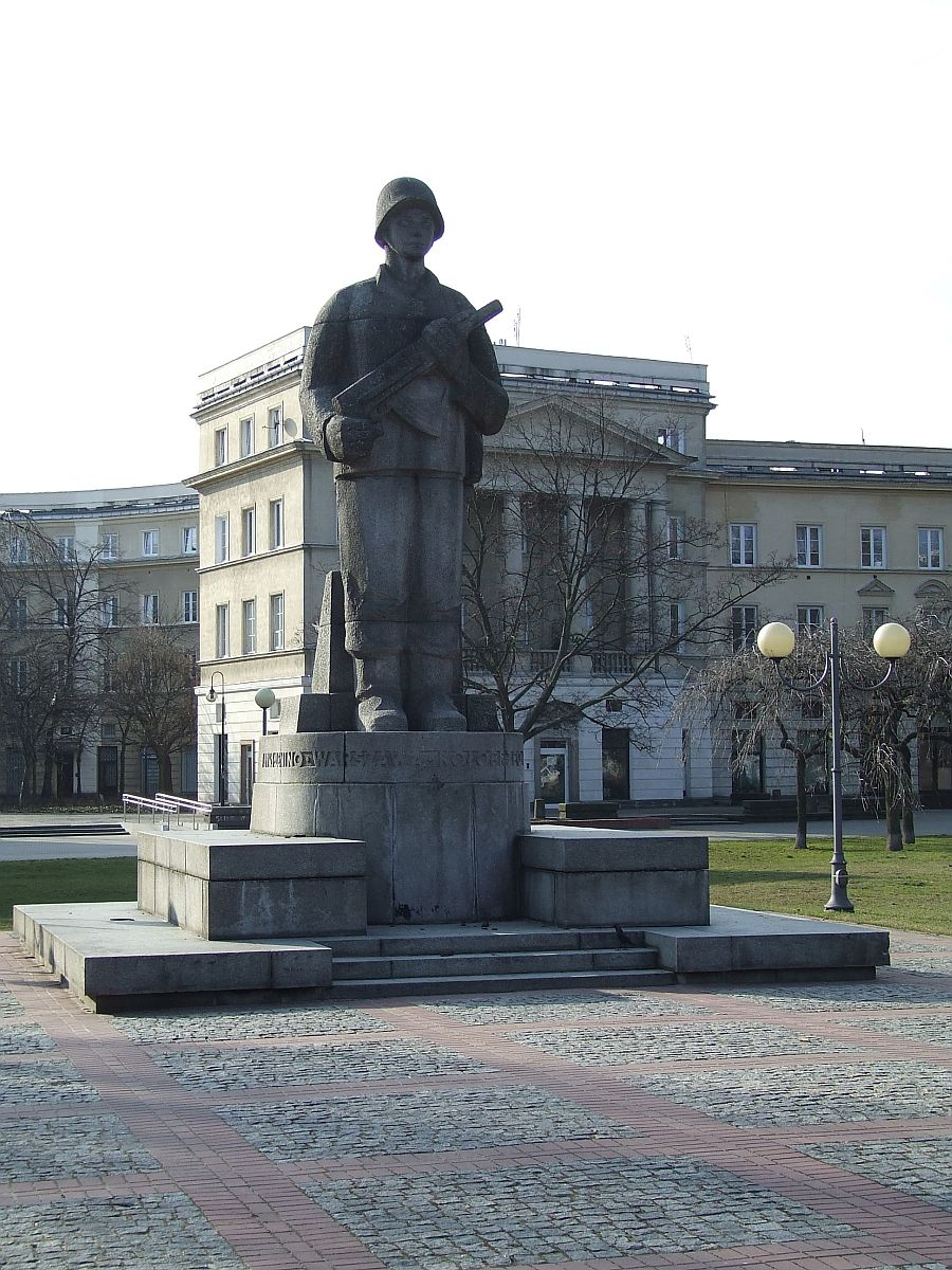 Pomnik Żołnierza 1 Armii Wojska Polskiego